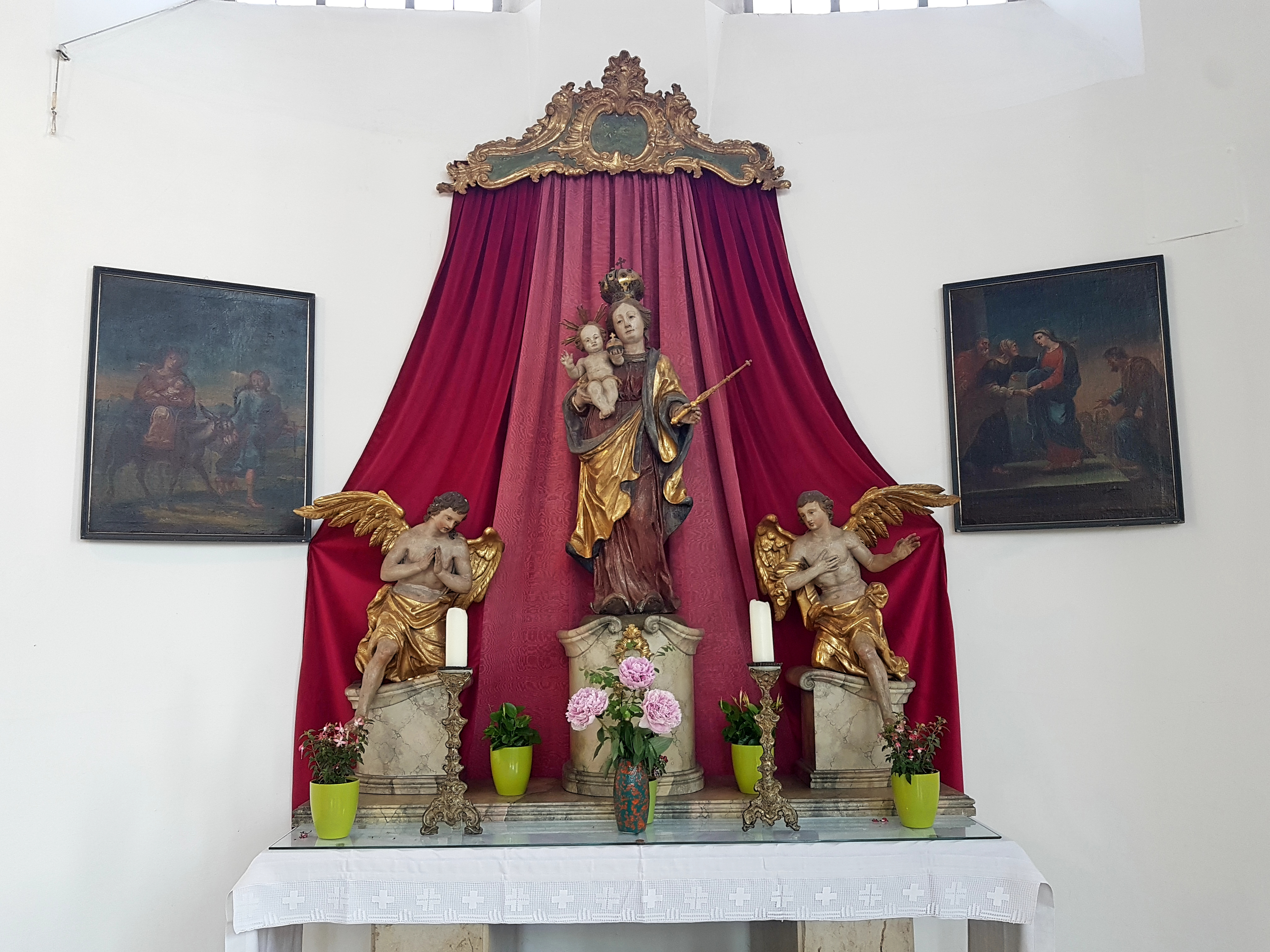 München-Nymphenburg, Christkönigkirche, linker Seitenaltar